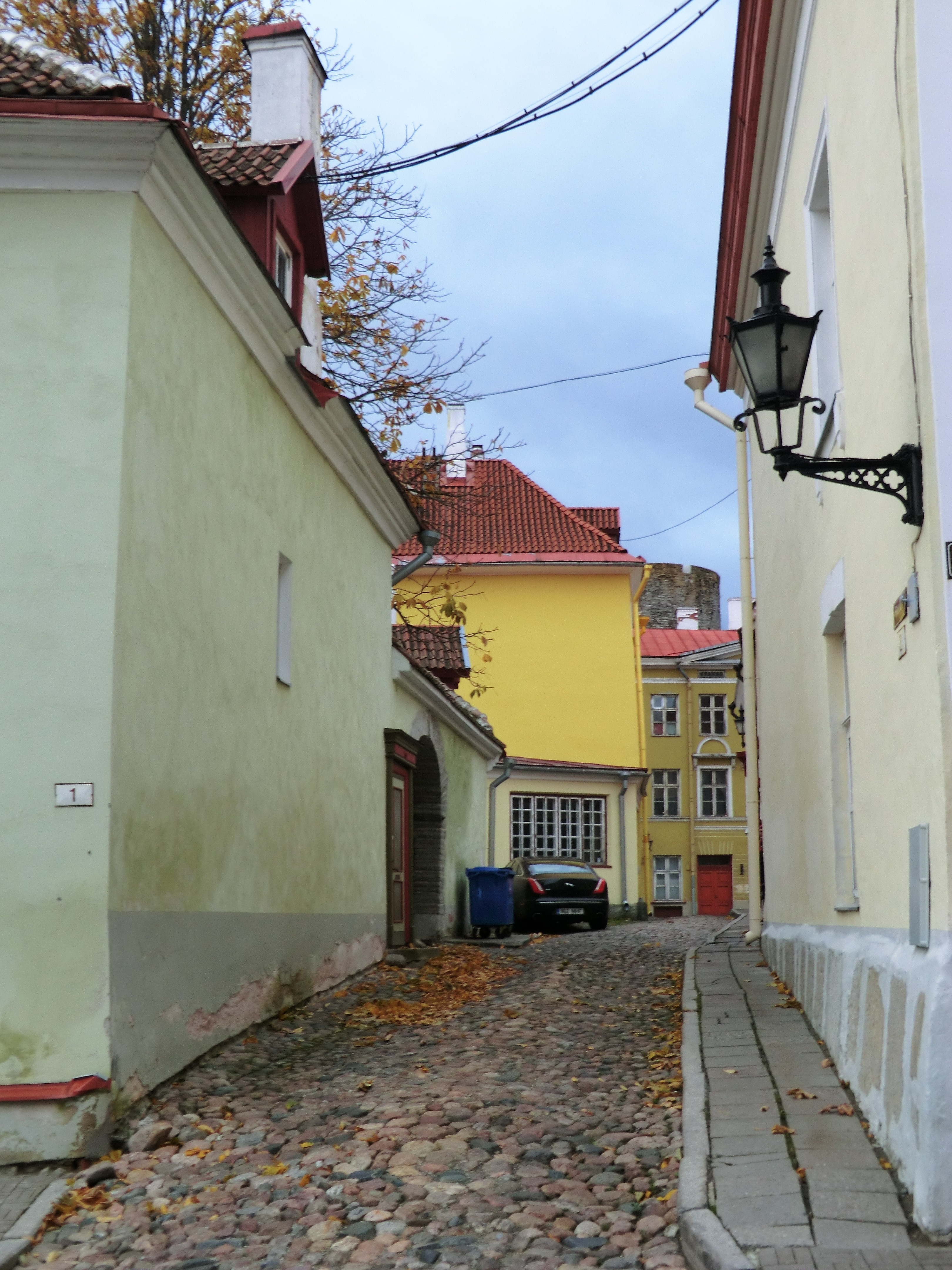 Tallinn